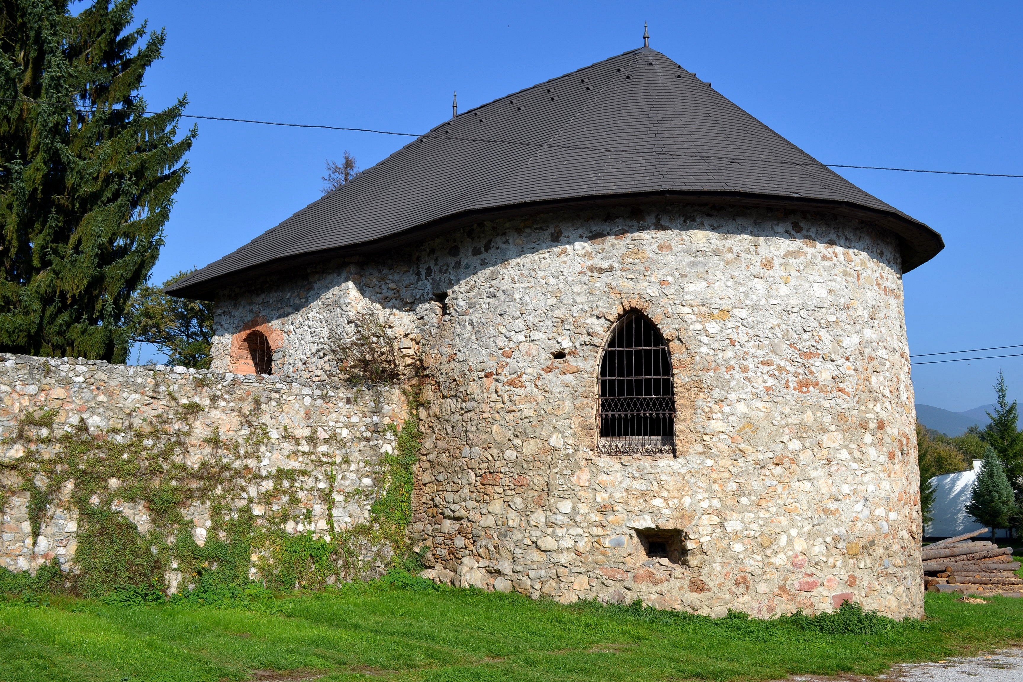 Bašta vodného hradu